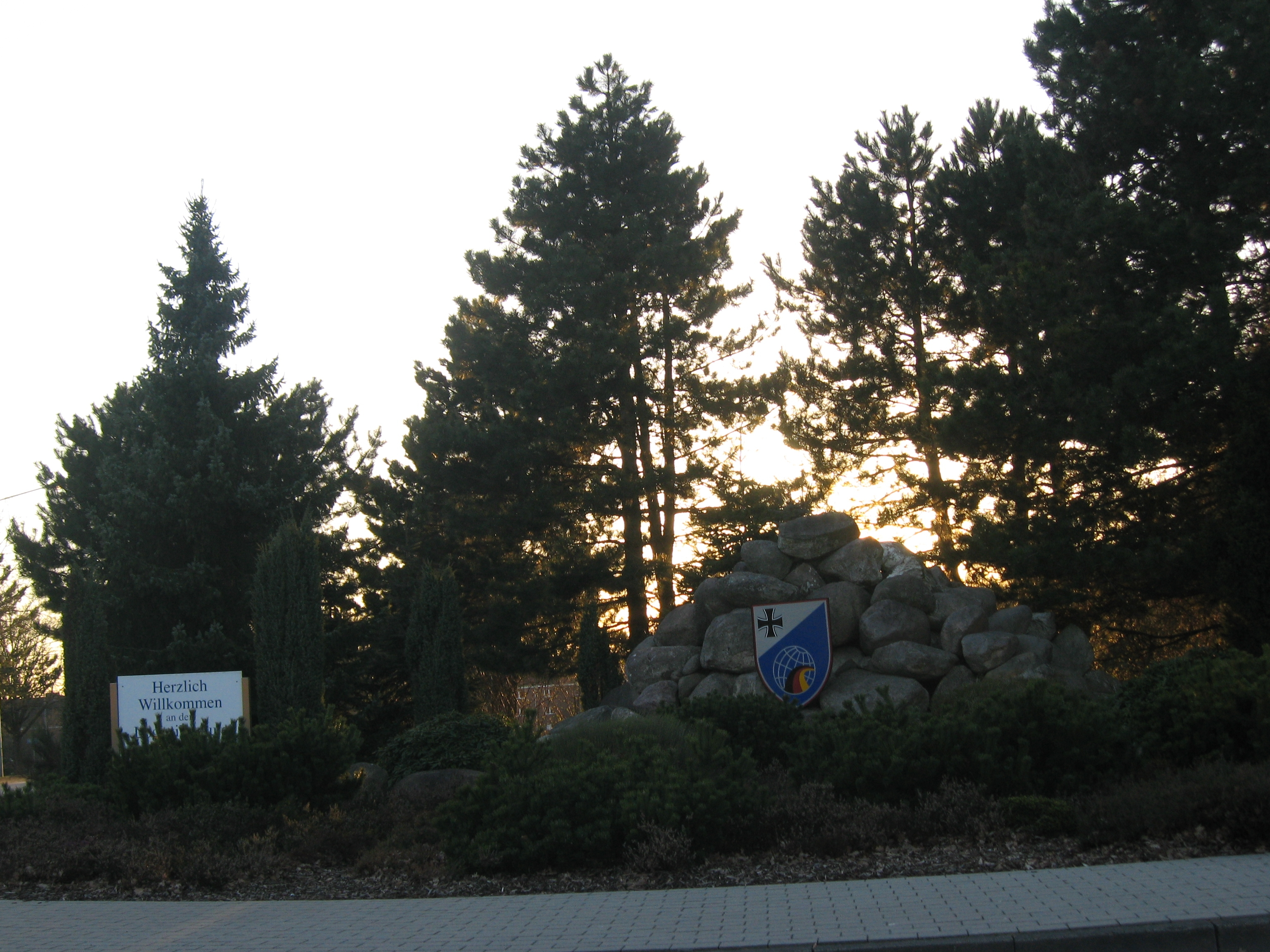 Begrüßung im Zufahrtsbereich zur Logistikschule der Bundeswehr in Garlstedt Datum: 28.03.2011 Urheber: M. Pfeiffer alias Benutzer:Gordito1869 Quelle: privates Fotoarchiv des Urhebers